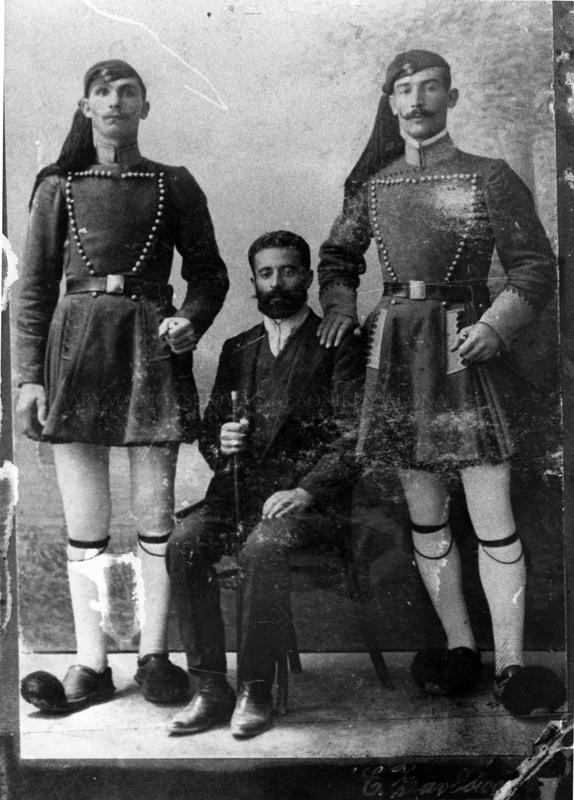 Гръцкият андартски капитан Дукас Дукас в средата.